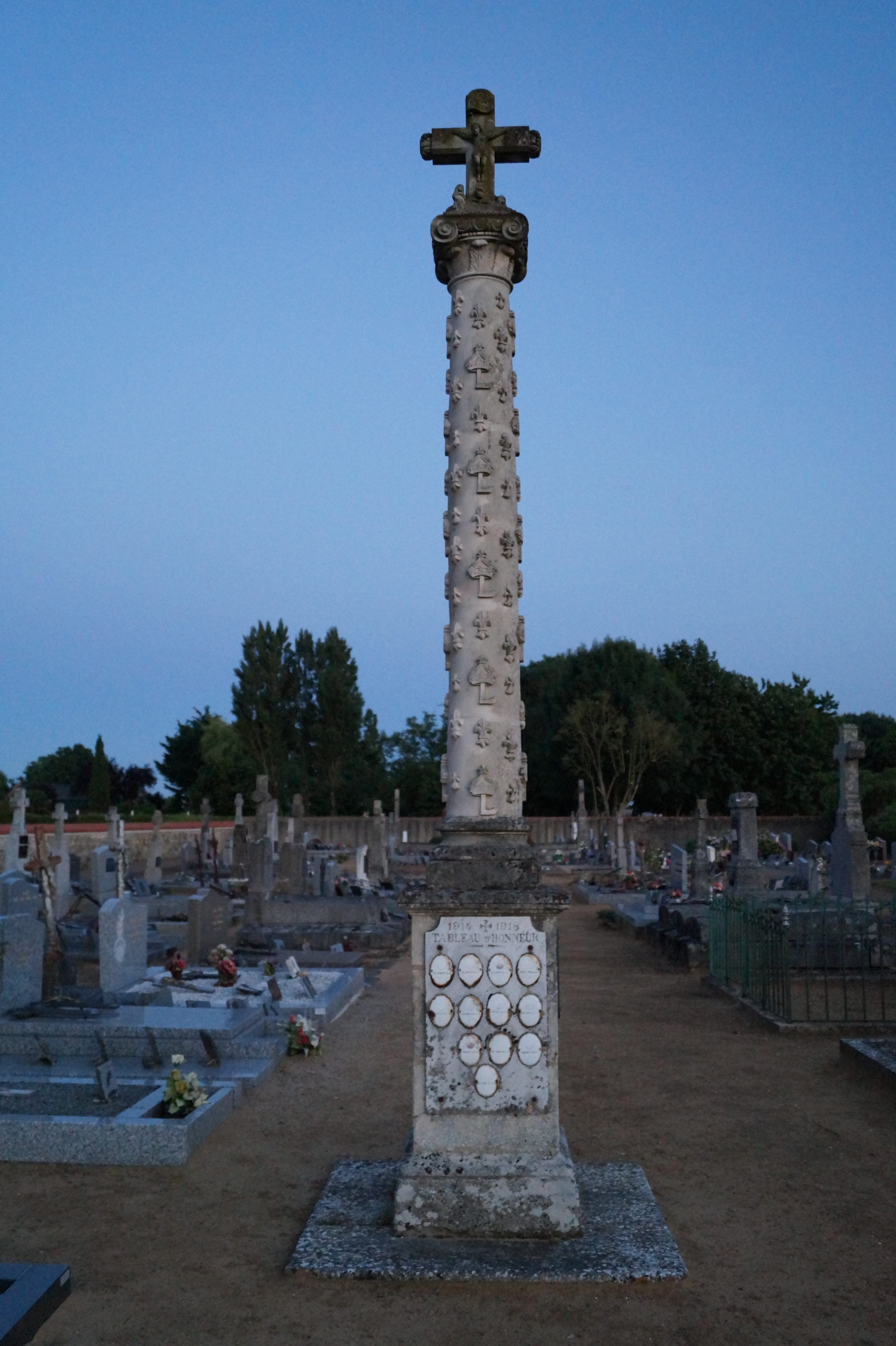 La croix hosannière de La Jonchère depuis le cimetière.